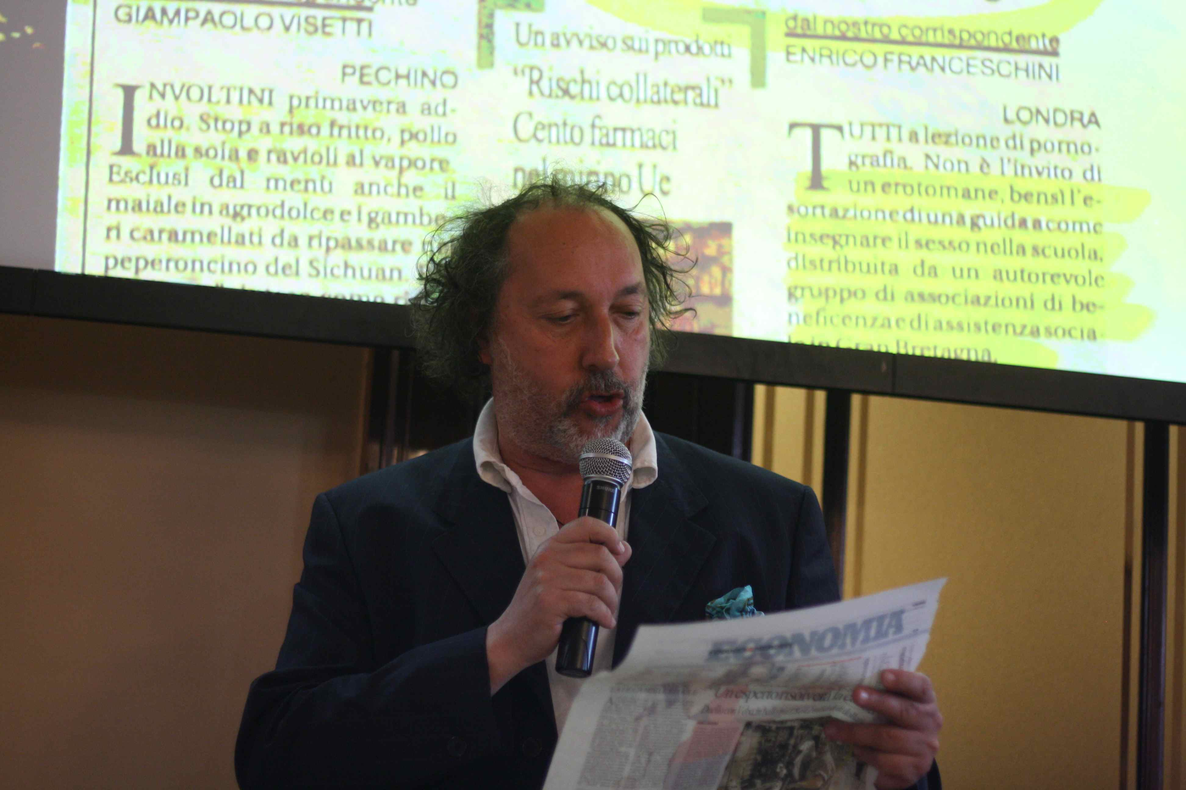 Fulvio Abbate durante una rassegna stampa al Festival del Giornalismo di Perugia.